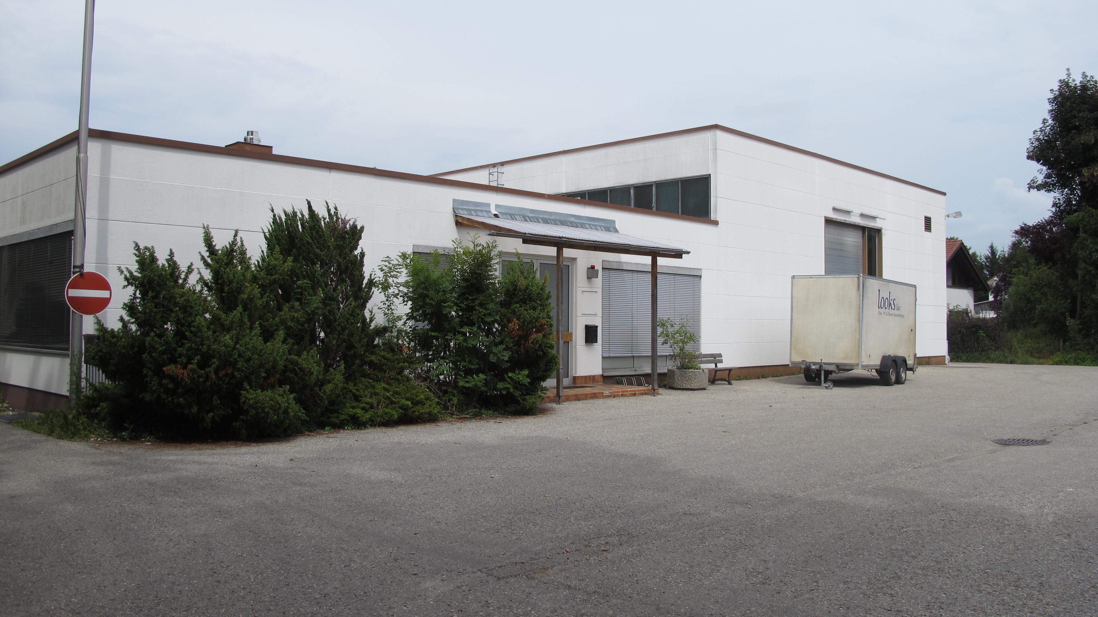 Das Revier von Hubert und Staller in der Sauerlacher Str. 25a in Wolfratshausen.